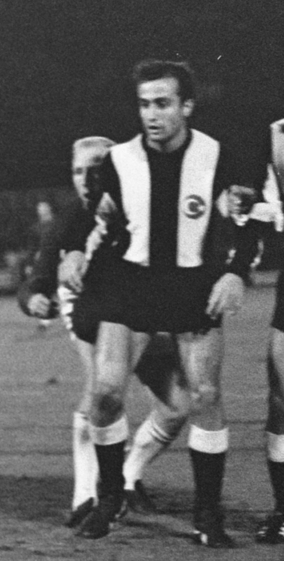 Voetbalwedstrijd Ajax - Besiktas in het Amsterdamse Olympisch Stadion: 2-0